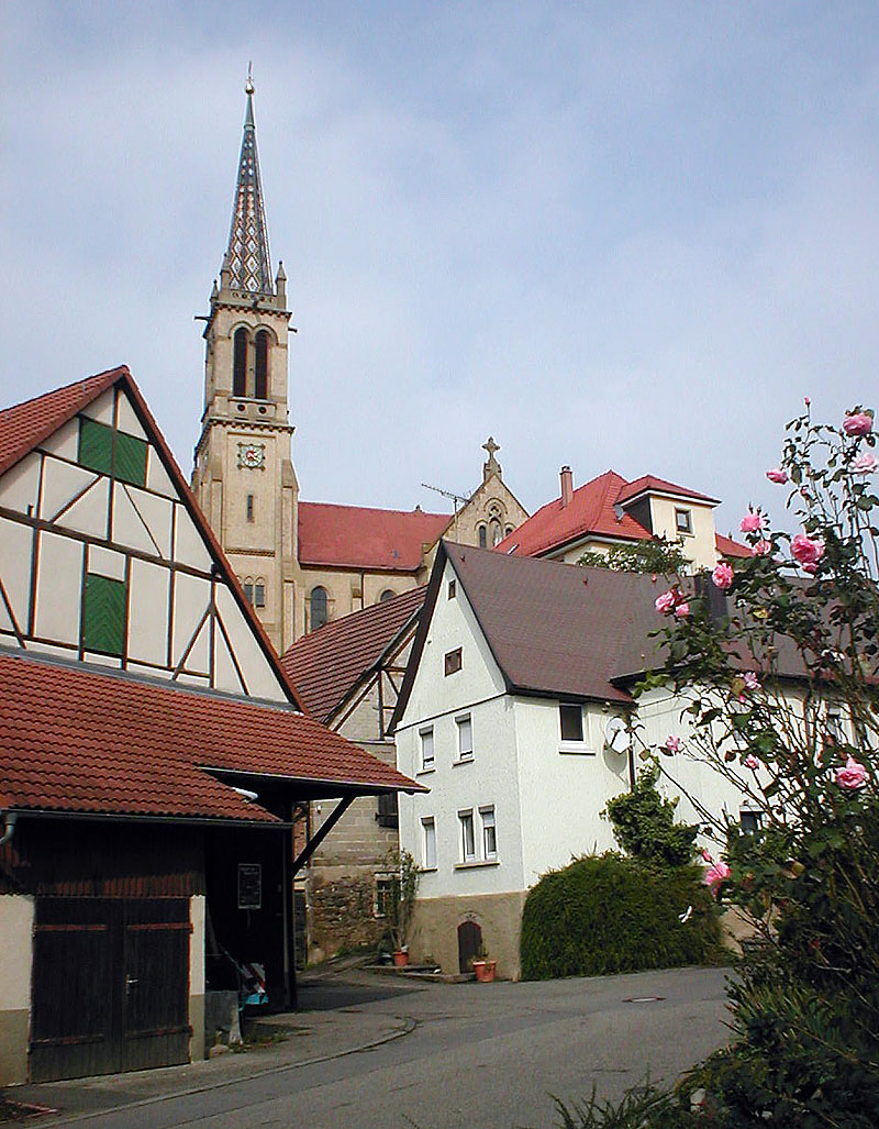 Stein am Kocher (heute Ortsteil von Neuenstadt am Kocher), Blick über die Ortsmitte zur Heiligkreuz-Kirche